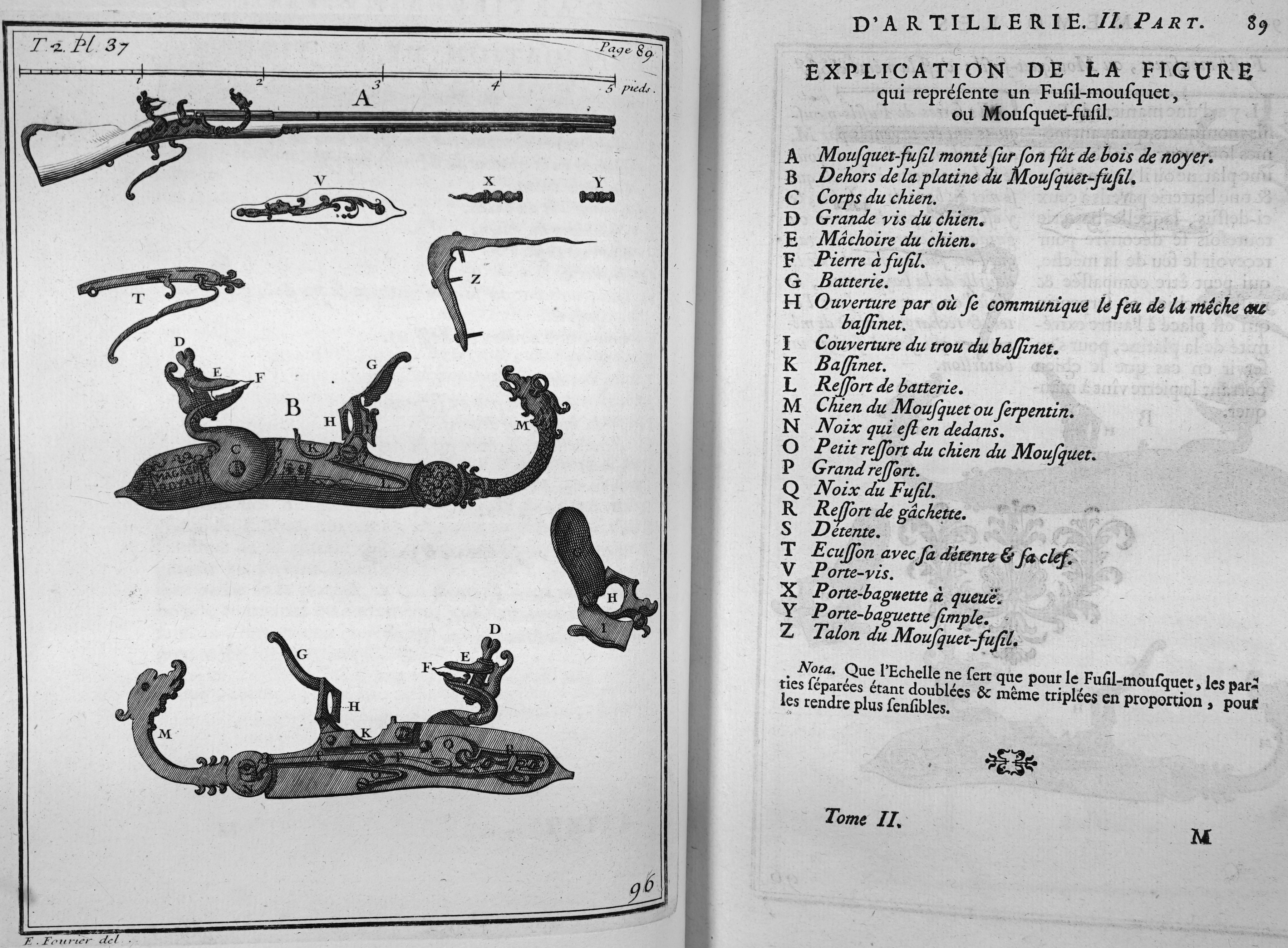 Mémoires d'artillerie, recueillis par M. Surirey de Saint Remy, exemplaire de la B.M. de Reims, troisième édition.